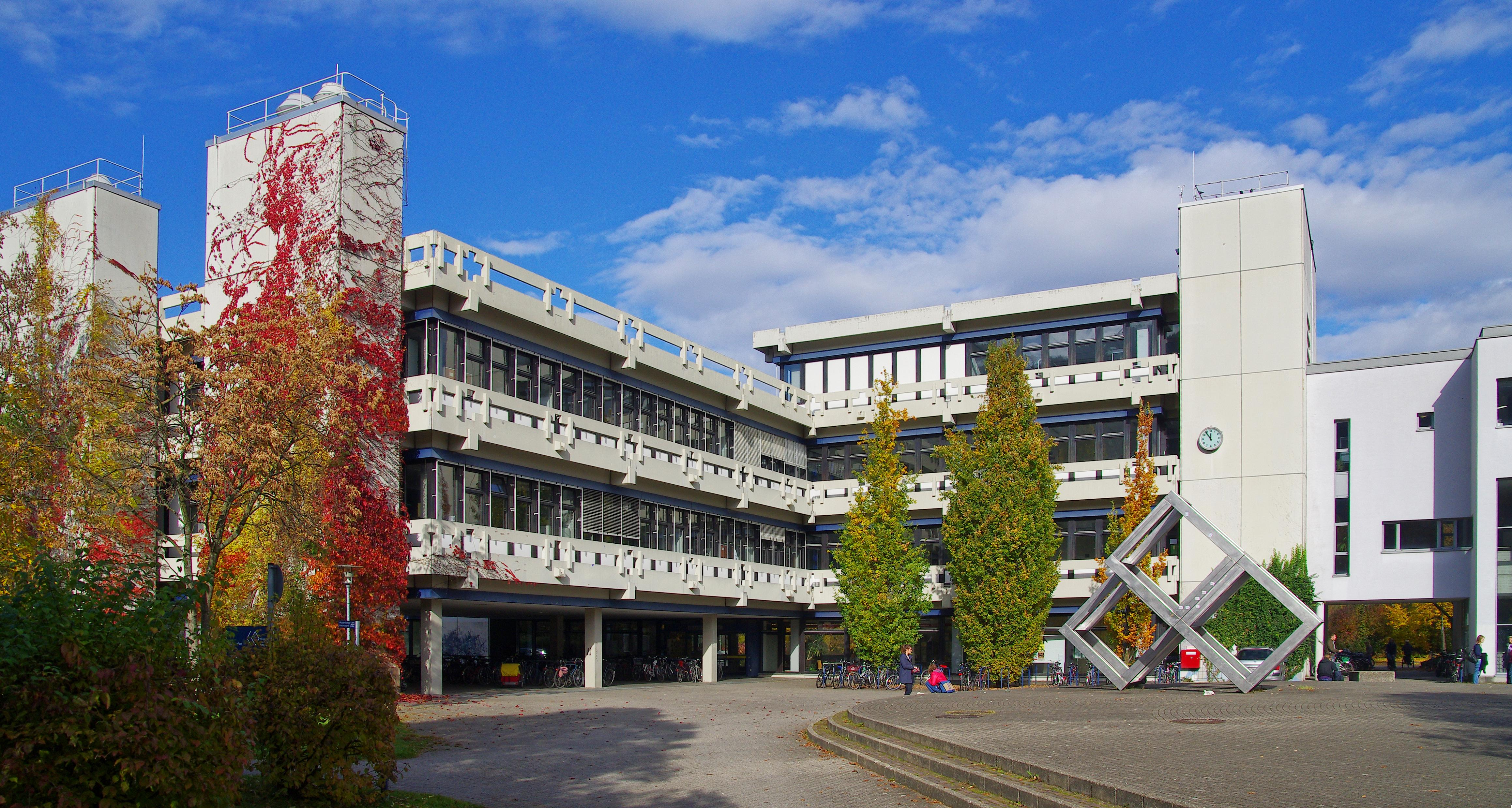 Pädagogische Hochschule Freiburg mit Gekippte Würfel (Alf Lechner, 1973/75)